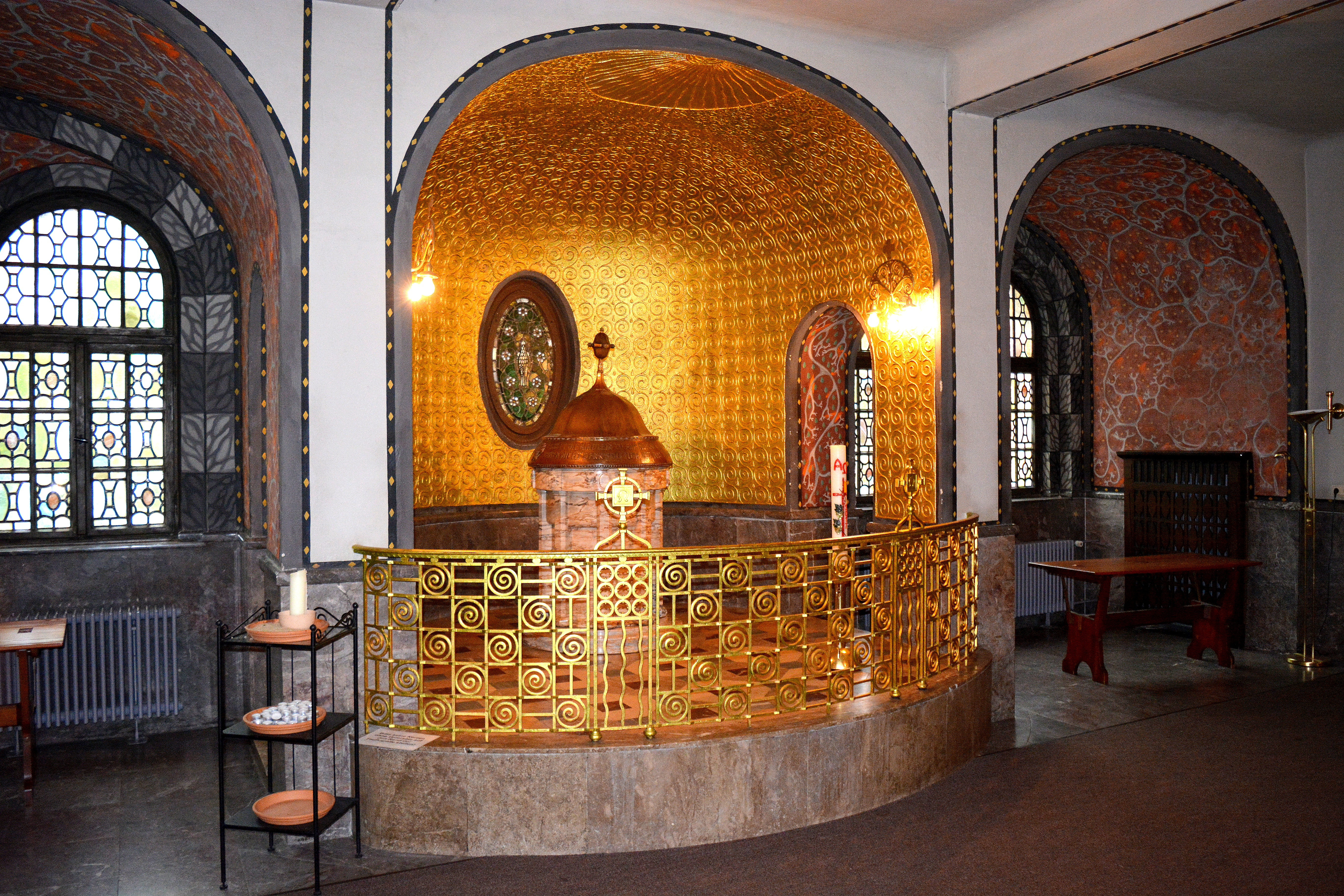 Wiesbaden, Lutherkirche, Vorraum (Taufkapelle)